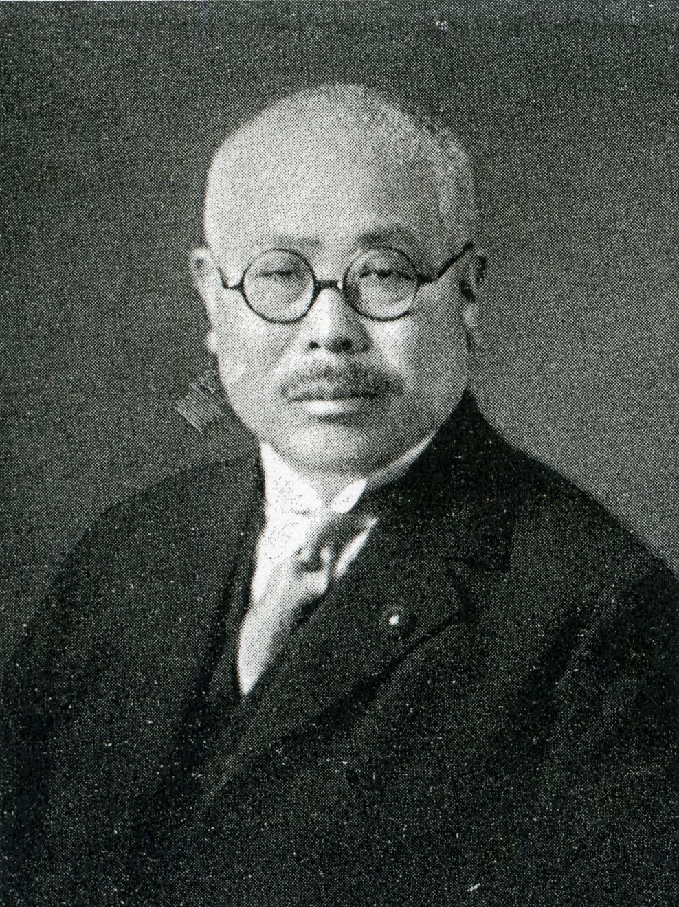 この写真は、井本常作（1880-1969）の写真です。